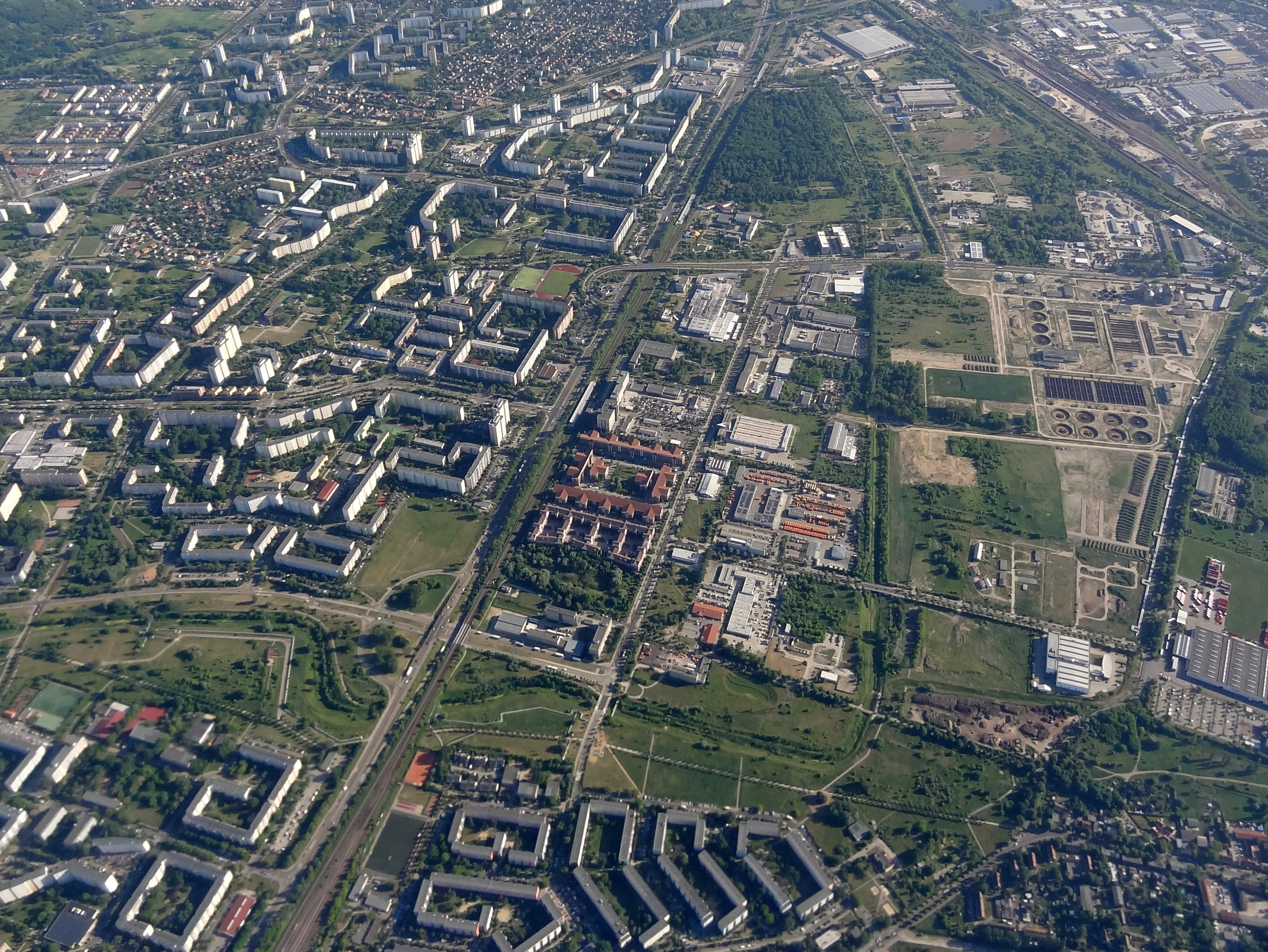 Blick auf Berlin-Marzahn, Berlin, Deutschland